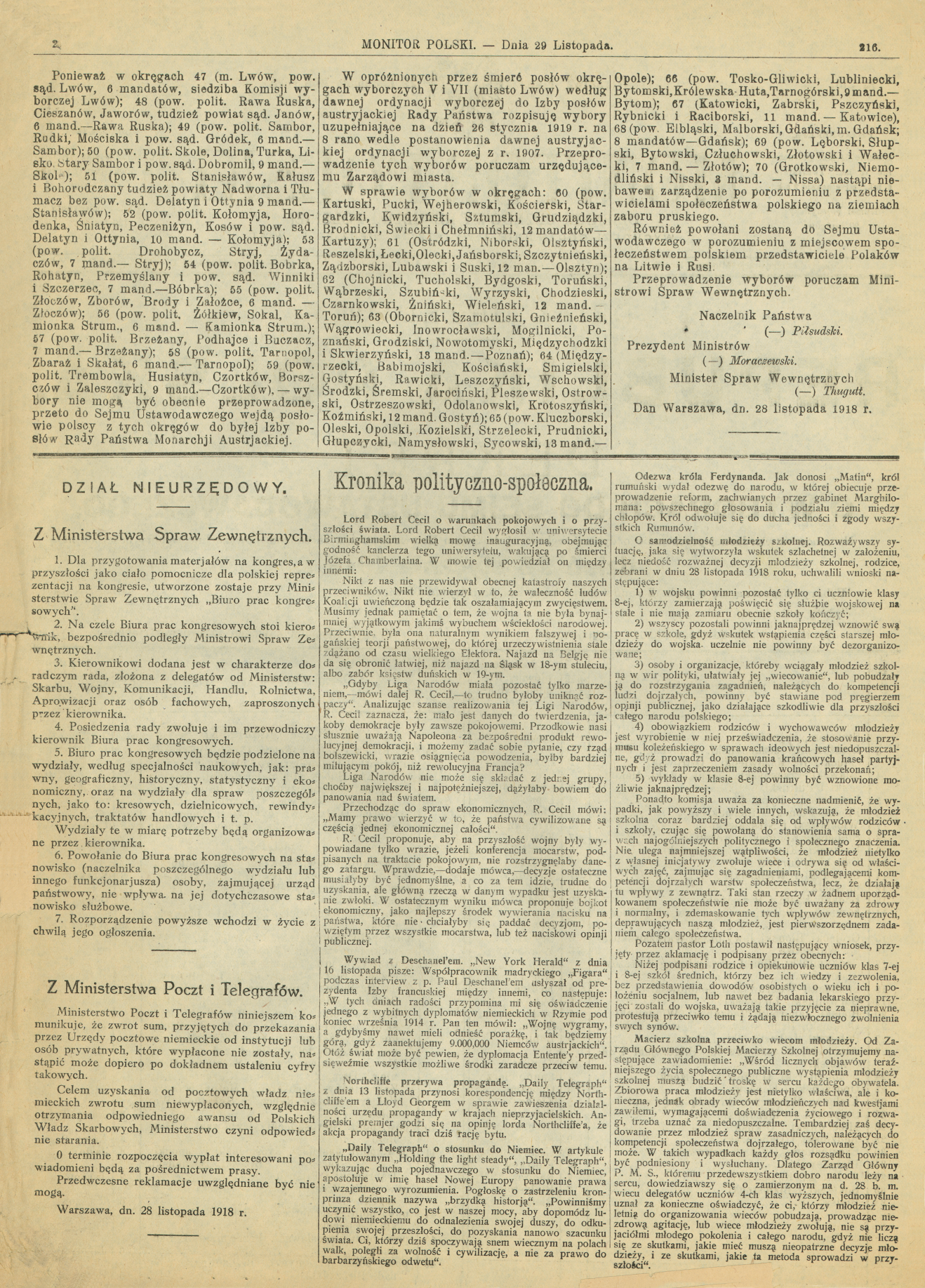 Dekret o wyborach do Sejmu Ustawodawczego opublikowany w Monitorze Polskim